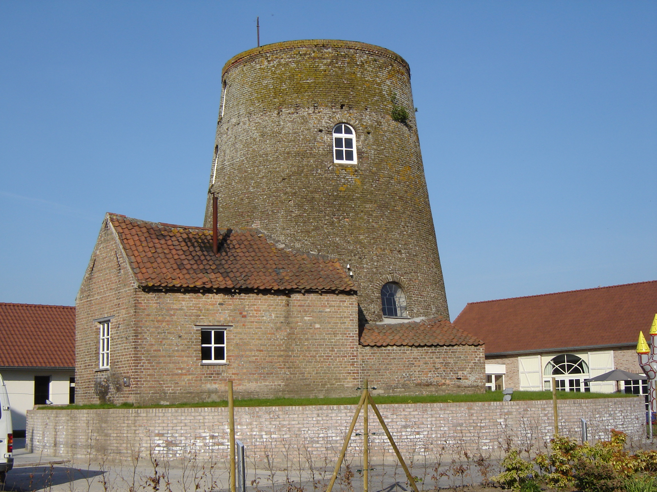 Kruiskalsijdemolen in Leke Kruiskalsijde mill, former windmill in Leke, Diksmuide, West Flanders, Belgium